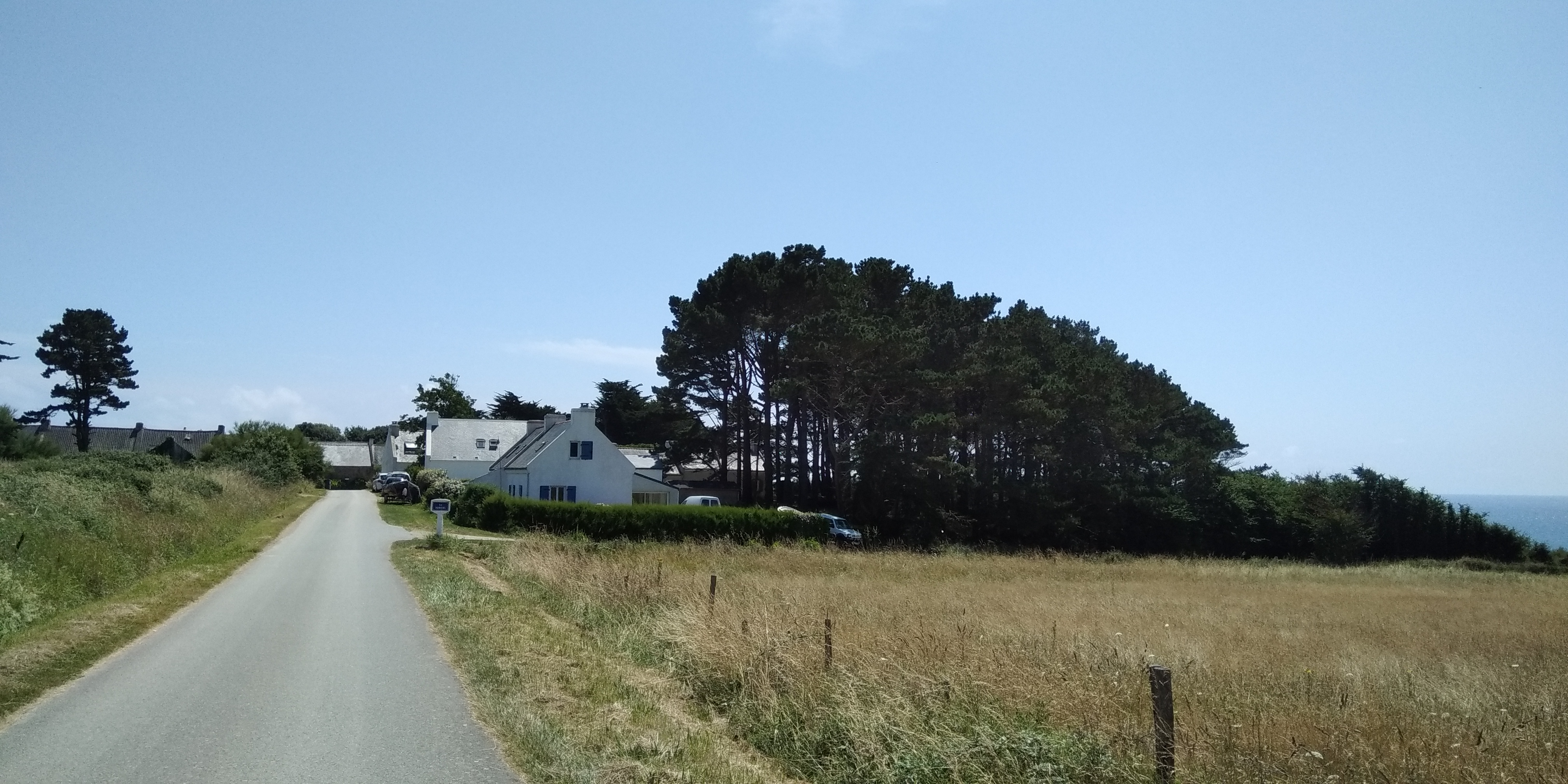 Entrée du hameau du Skeul, Locmaria, Belle-Île